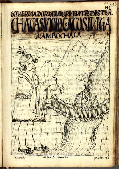 Ponti Inca